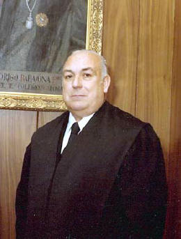 José Antonio Muñoz García togado en 1979